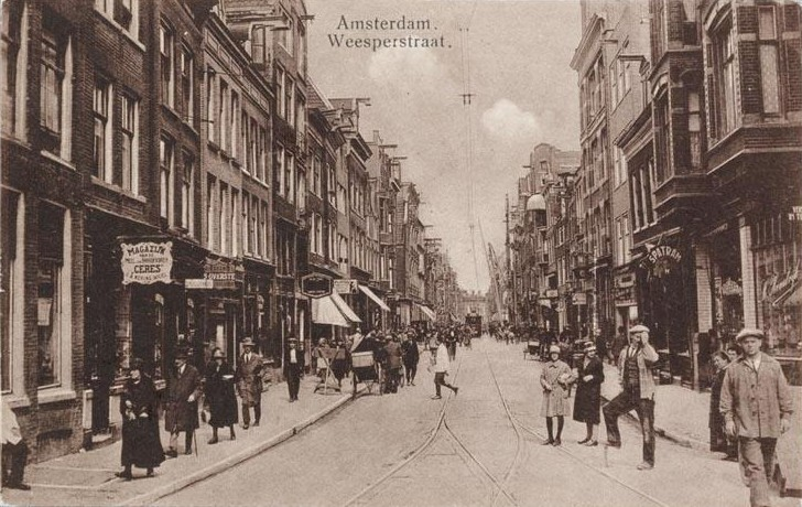 Prentbriefkaart van de Weesperstraat in Amsterdam, circa 1920